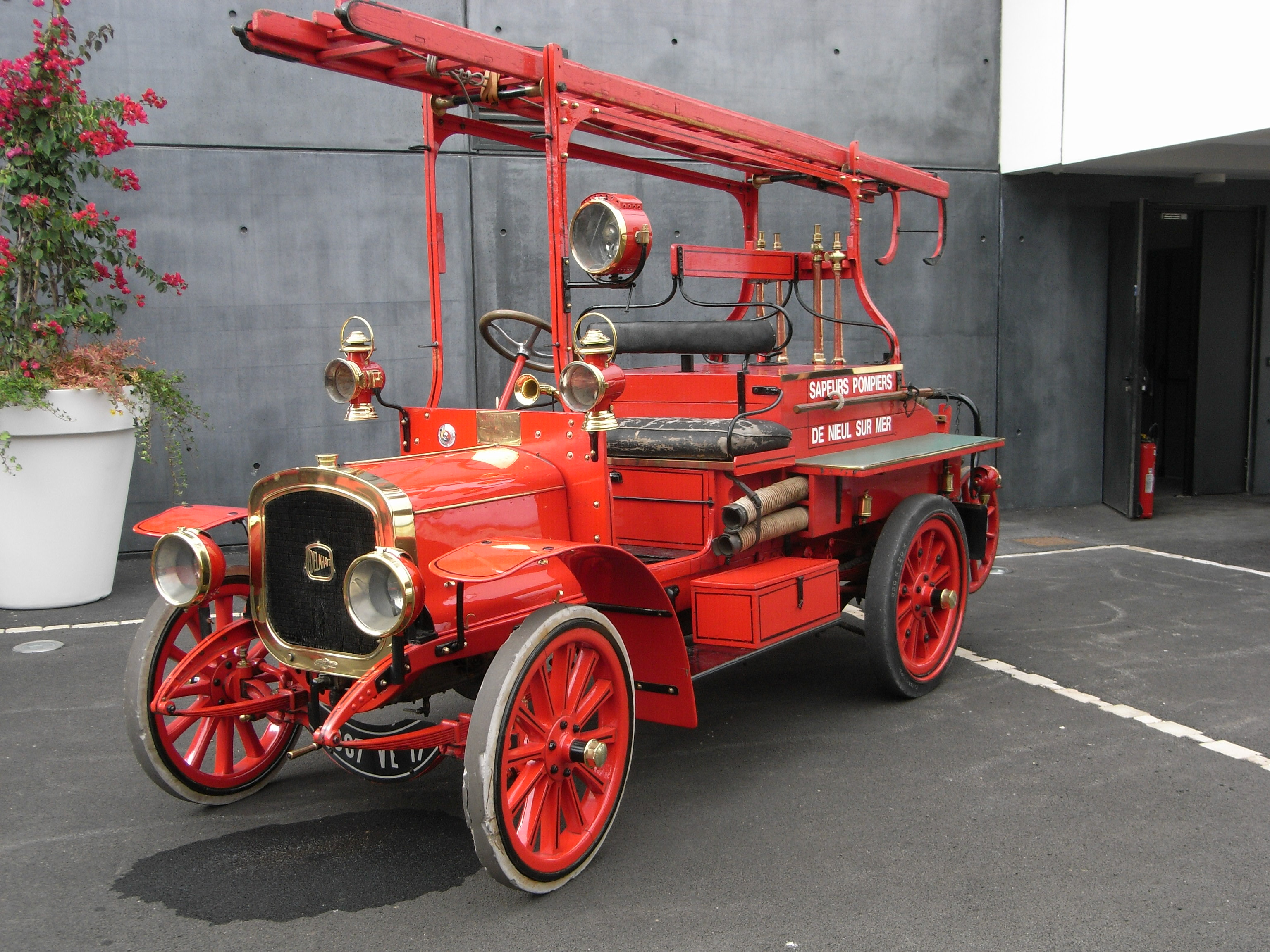 Autopompe DELAHAYE-FARCOT, type 32 n° 3562 - Sapeurs pompiers de Nieul sur Mer (17).